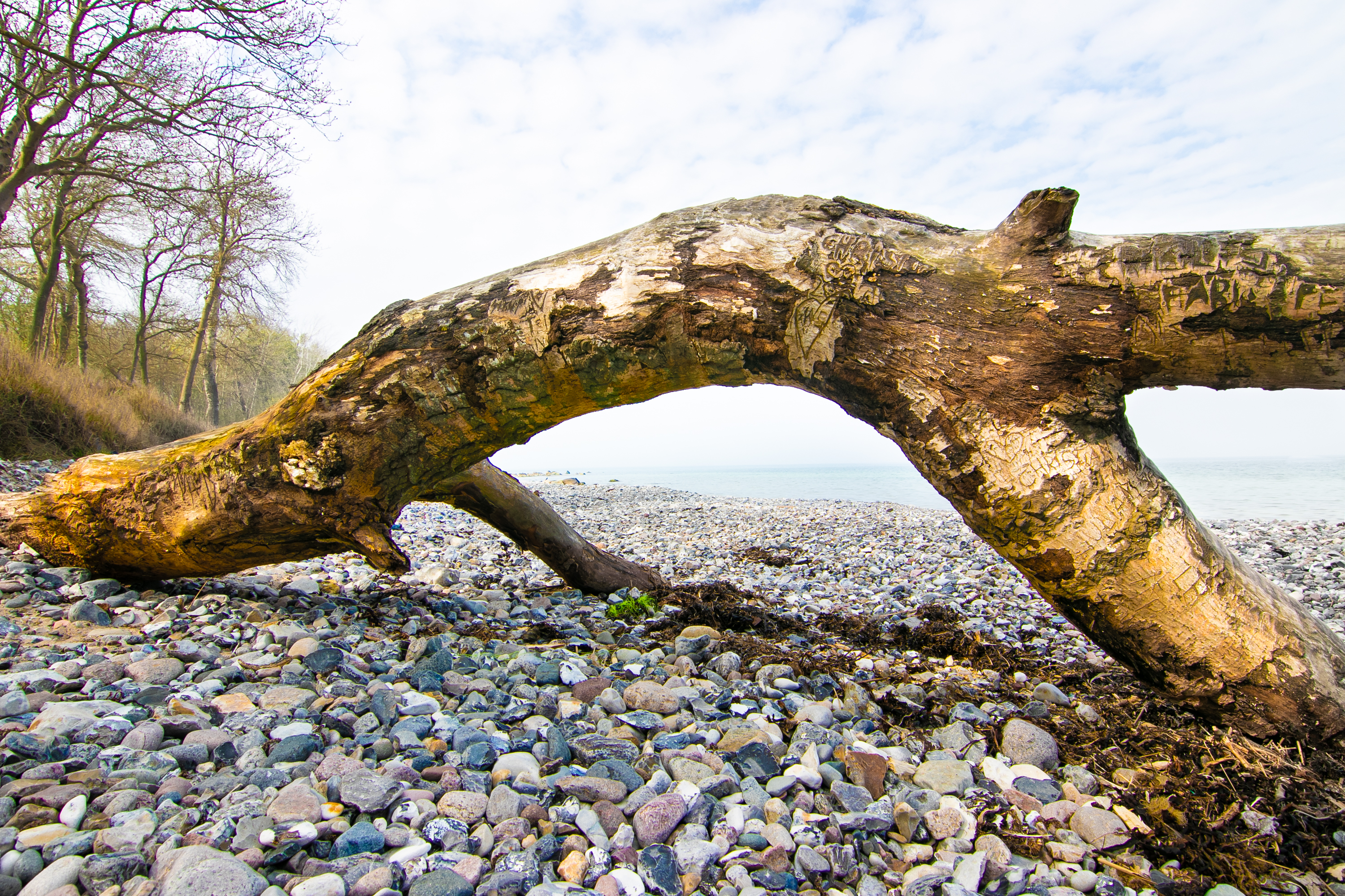 Die Steilküste bei Katharinenhof im Landschaftsschutzgebiet Insel Fehmarn.